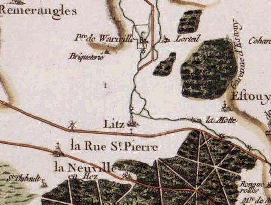 Litz (60), carte de Cassini.